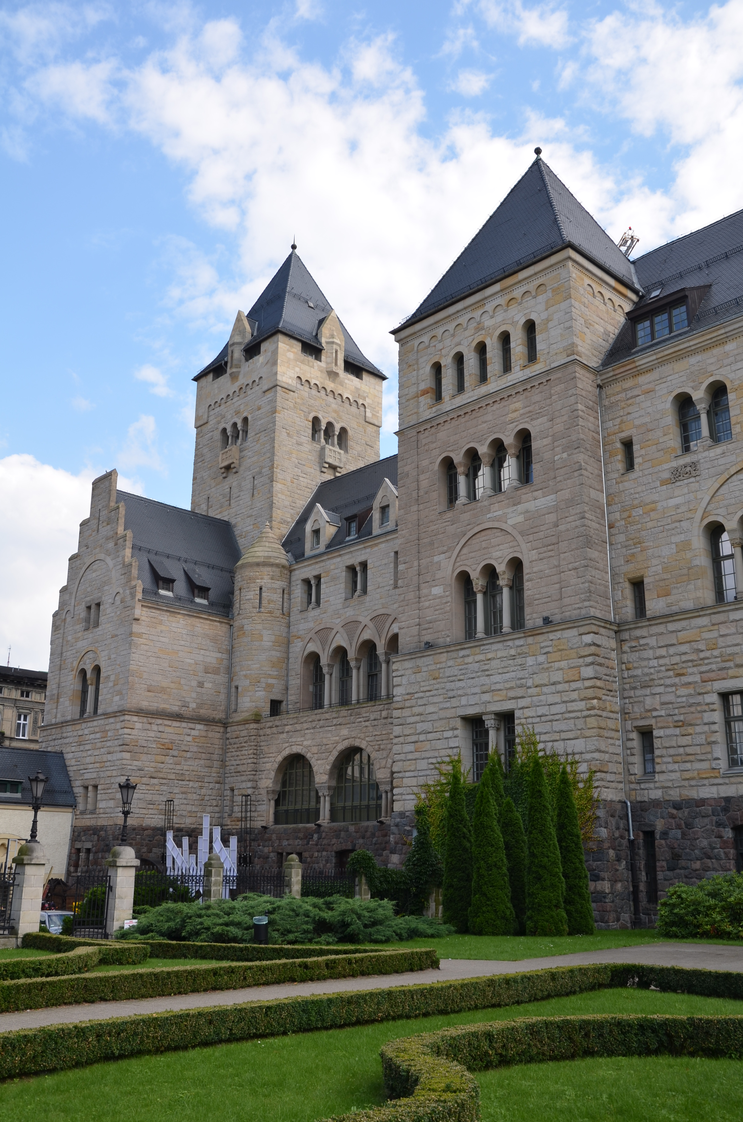 Poznań, nowy zamek, ob. centrum kultury, 1905-1945.Dawny zamek cesarski, obecnie Centrum Kultury "Zamek" w Poznaniu, miasto - powiat grodzki Poznań, woj. wielkopolskie